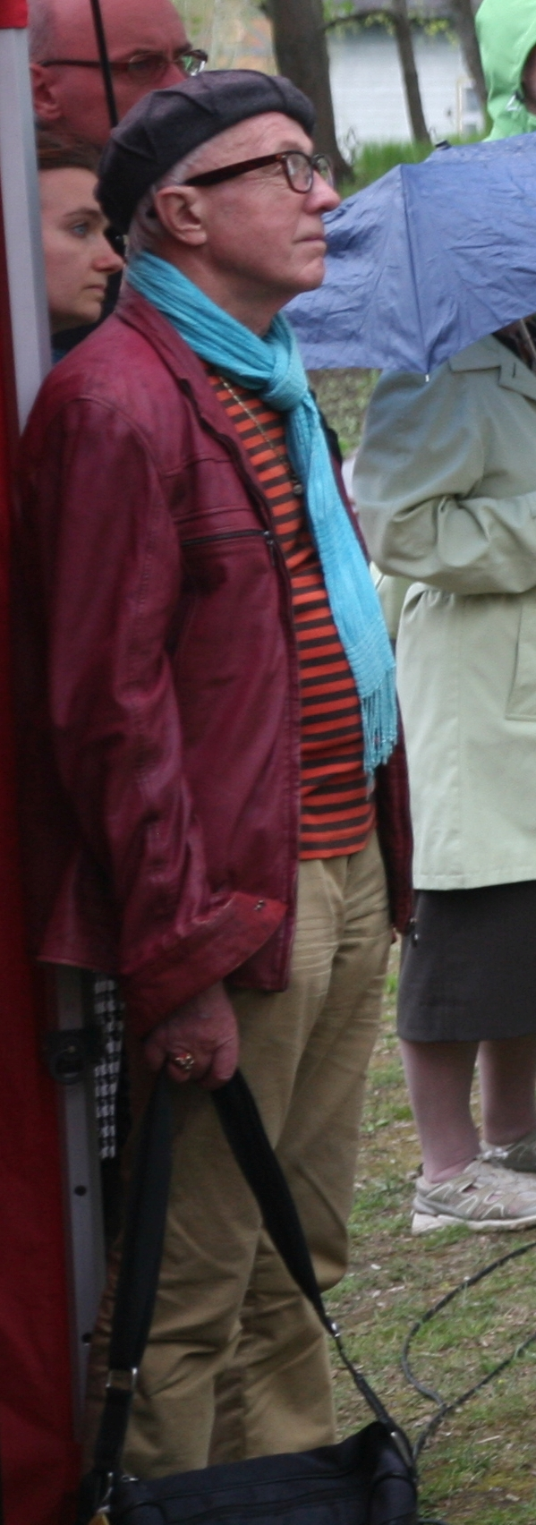 Kalju Konsin Prima Vista 2015 avamisel